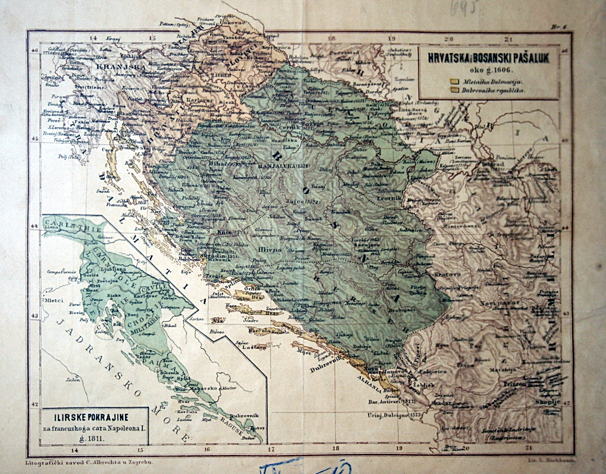 Zemljovid, snimljeno tijekom Noći muzeja